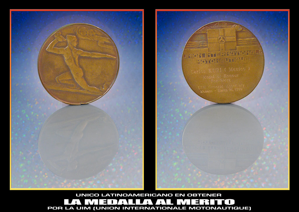 Mónaco, 1999 U.I.M (Union Internationale Motonautique)